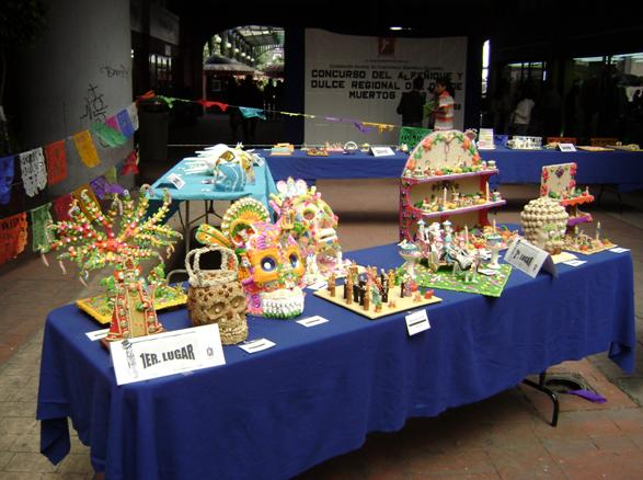 concurso del dulce regional de dia de muertos en toluca de san jose